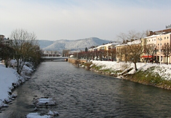 La Meurthe à Saint-Dié-des-Vosges